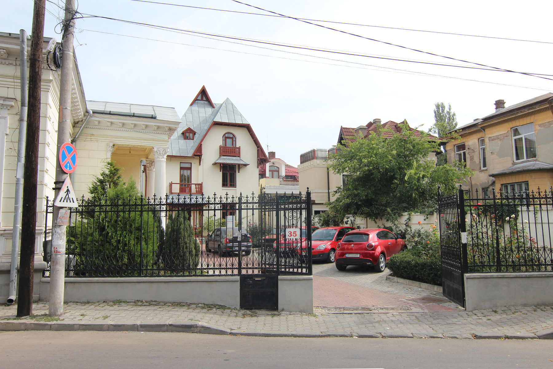 Casă pe Str Romulus